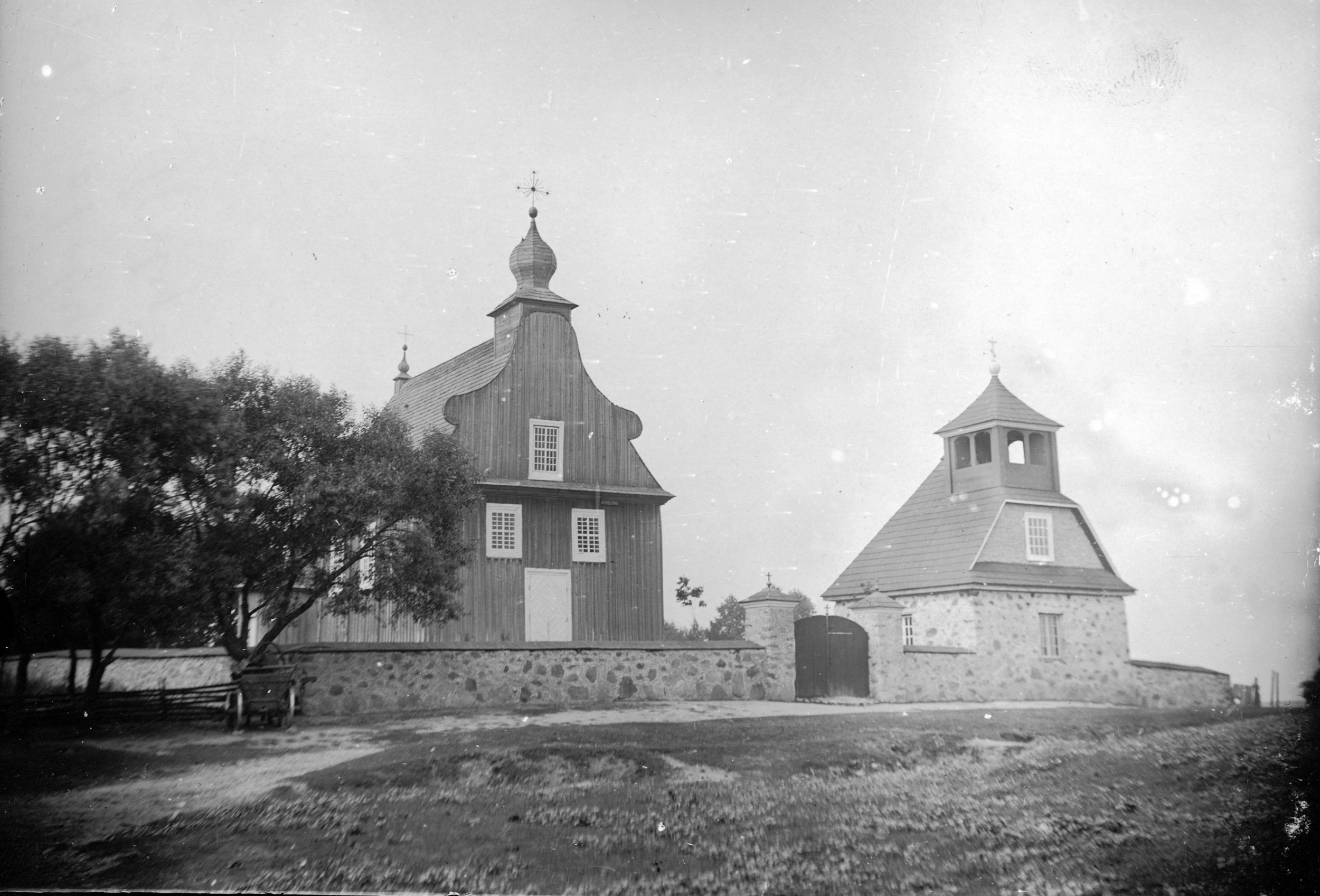 Беларуская (тарашкевіца): Латыгаль (Łatyhal). Мікольская царква